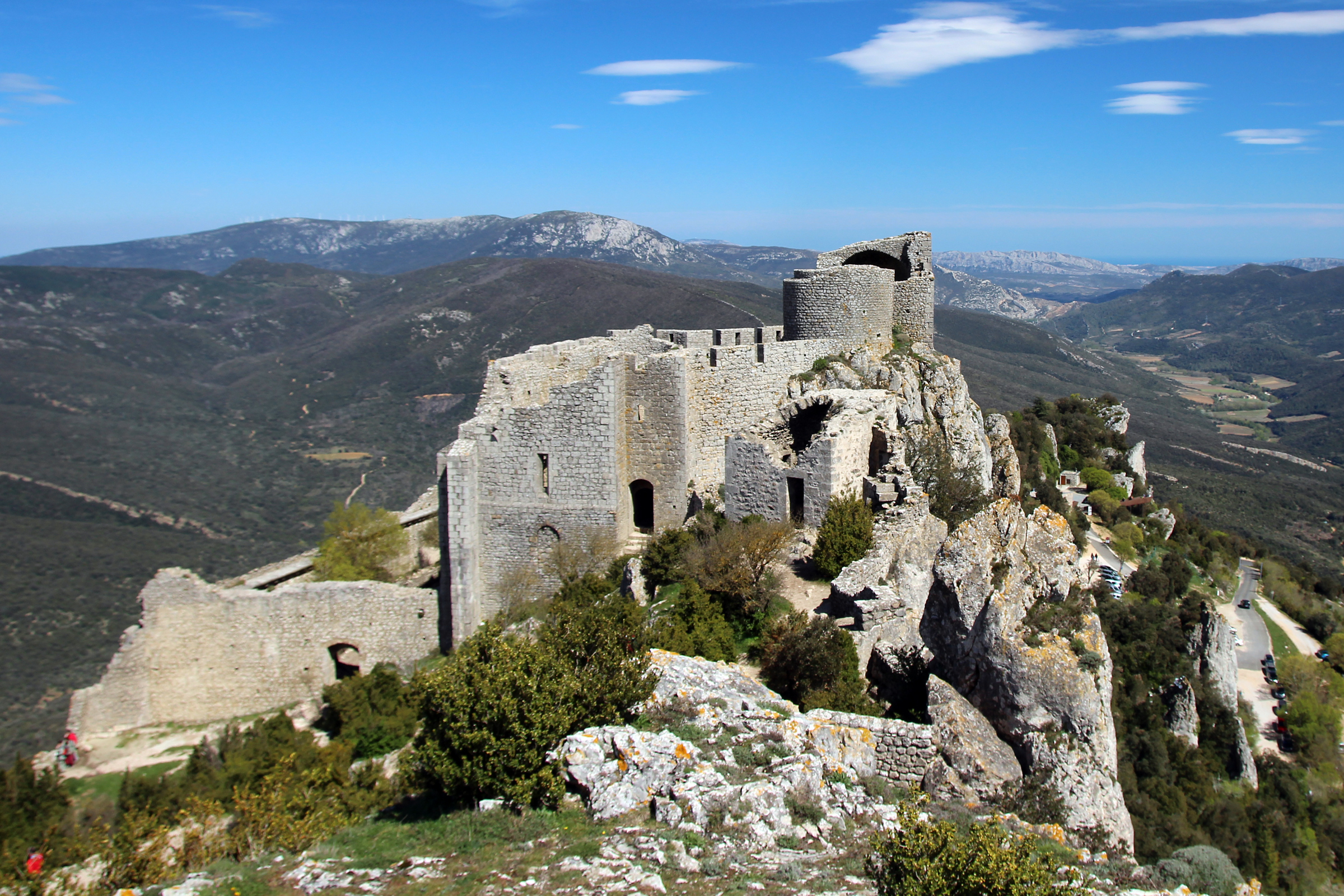 Forteresse de Peyrepertuse